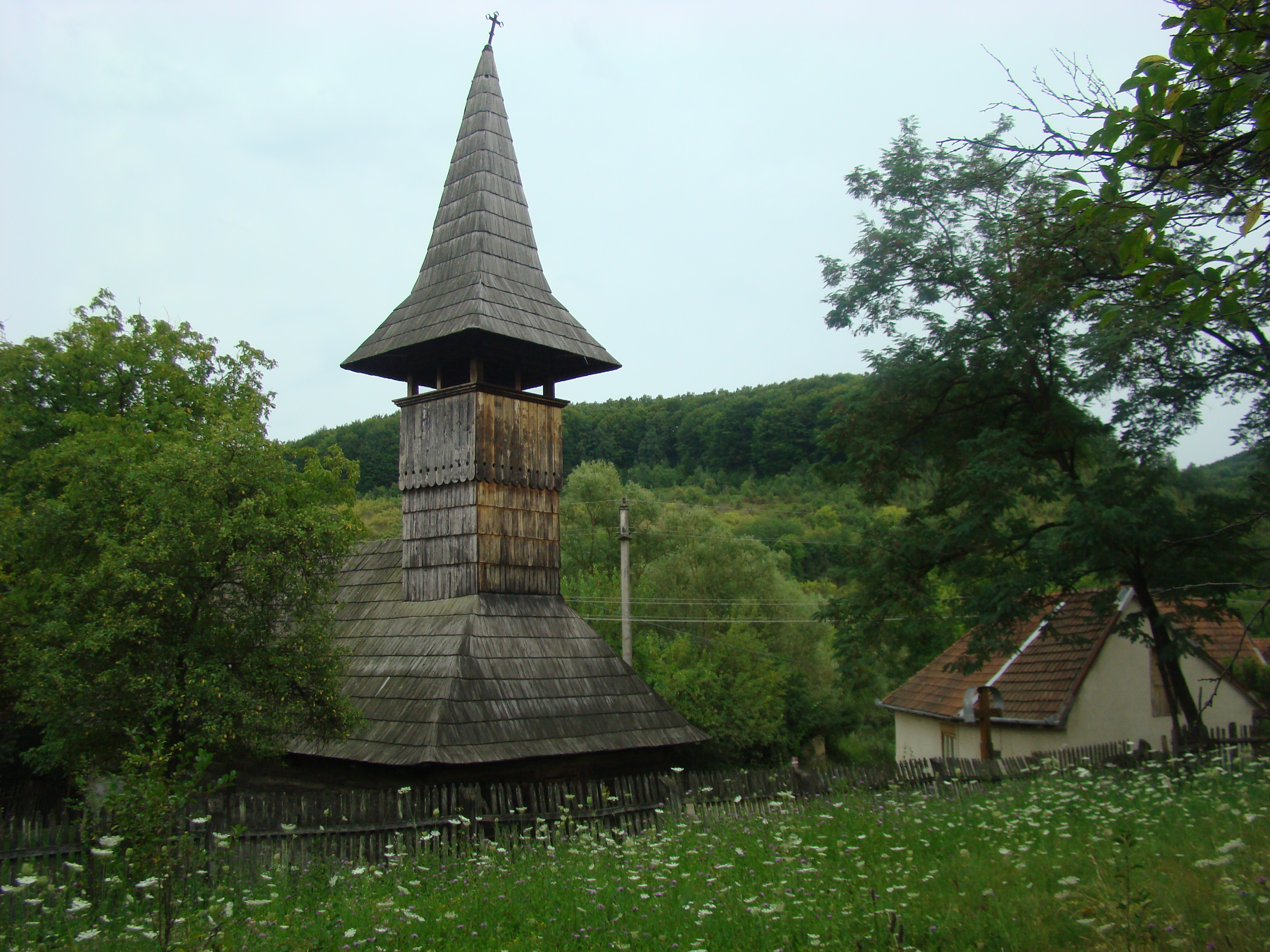 Biserica de lemn „Întâmpinarea Domnului” din Groșii Noi-Arad